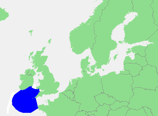 Keltische Zee /Celtic Sea